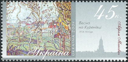 Абрам Маневич "Весна на Куренівці"